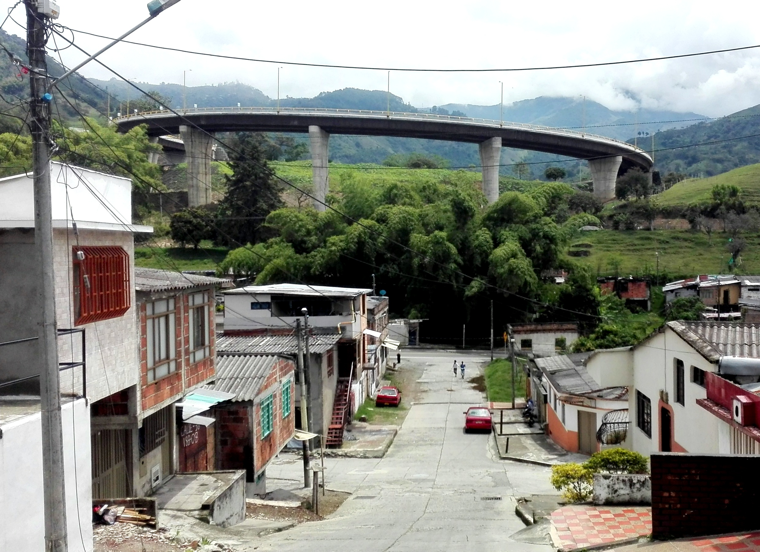 Viaducto Cafetal en Calarcá, Quindío. Cruce de la cordillera Central.